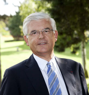 Hervé Biausser, directeur Ecole Centrale Paris